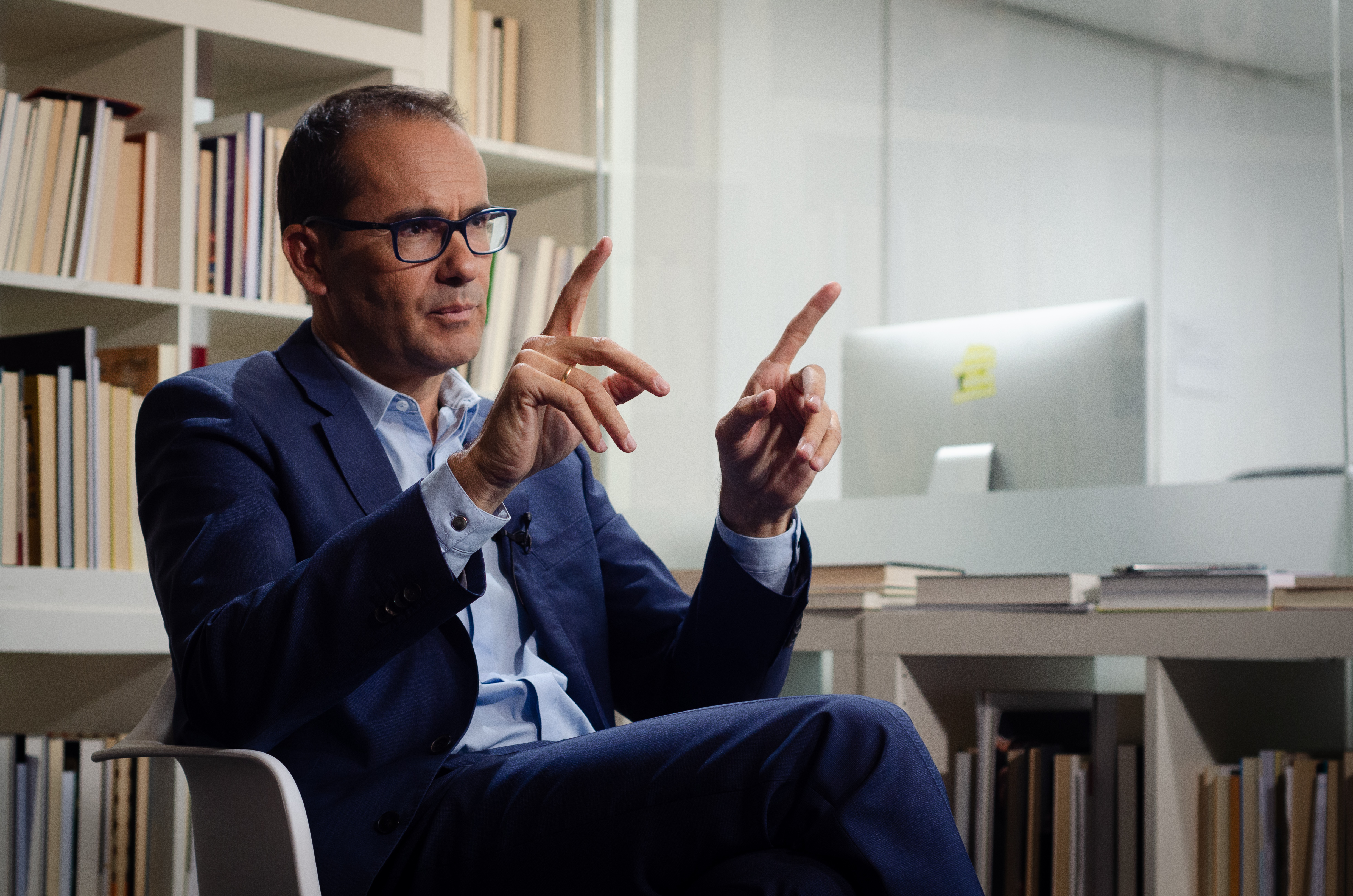 "Los años de Rajoy fueron el mayor ataque a la libertad de prensa desde la dictadura", dice el exdirector de El Mundo, que estrena libro sobre su experiencia. Jiménez desvela que el Gobierno pidió quitar a la redactora que cubría el PP y cómo Santamaría y Cospedal colocaban tertulianos en las teles para atacarse. En El Director relata cómo las élites económicas presionaron para atacar a Podemos para que no llegase al Gobierno: "Creían que les quitarían las casas de la playa". Sus memorias de un año al frente de El Mundo recopilan las presiones de ministros y directivos del IBEX.